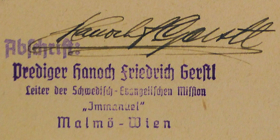 Ausschnitt mit der Signatur und dem Stempel des Predigers Hanoch Friedrich Gerstl (1899-1956) auf einer Kopie des Gesundheitszeugnisses für Feige Zając (1901–1943?) vom 29. Januar 1939.